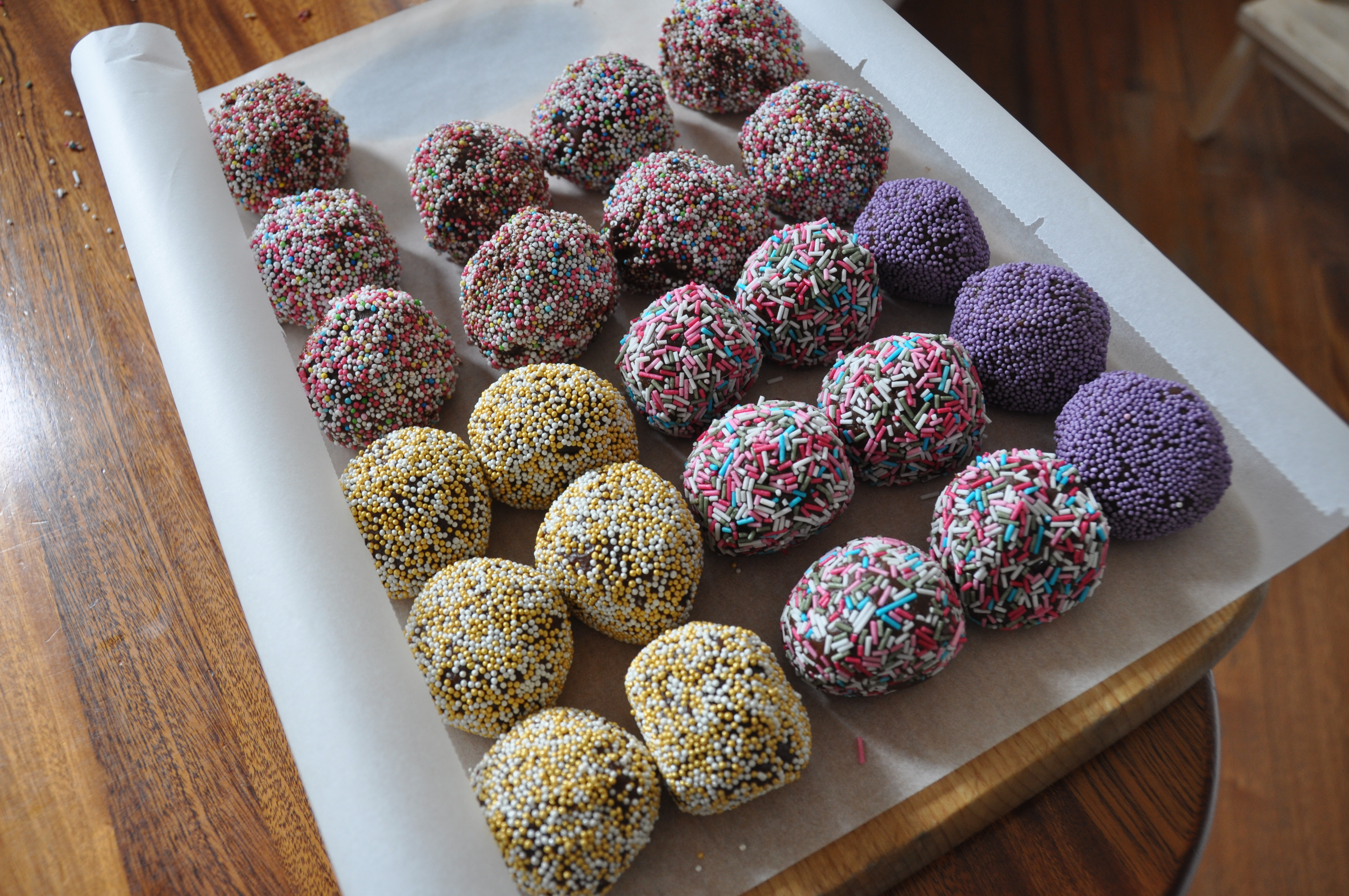 Romkugler